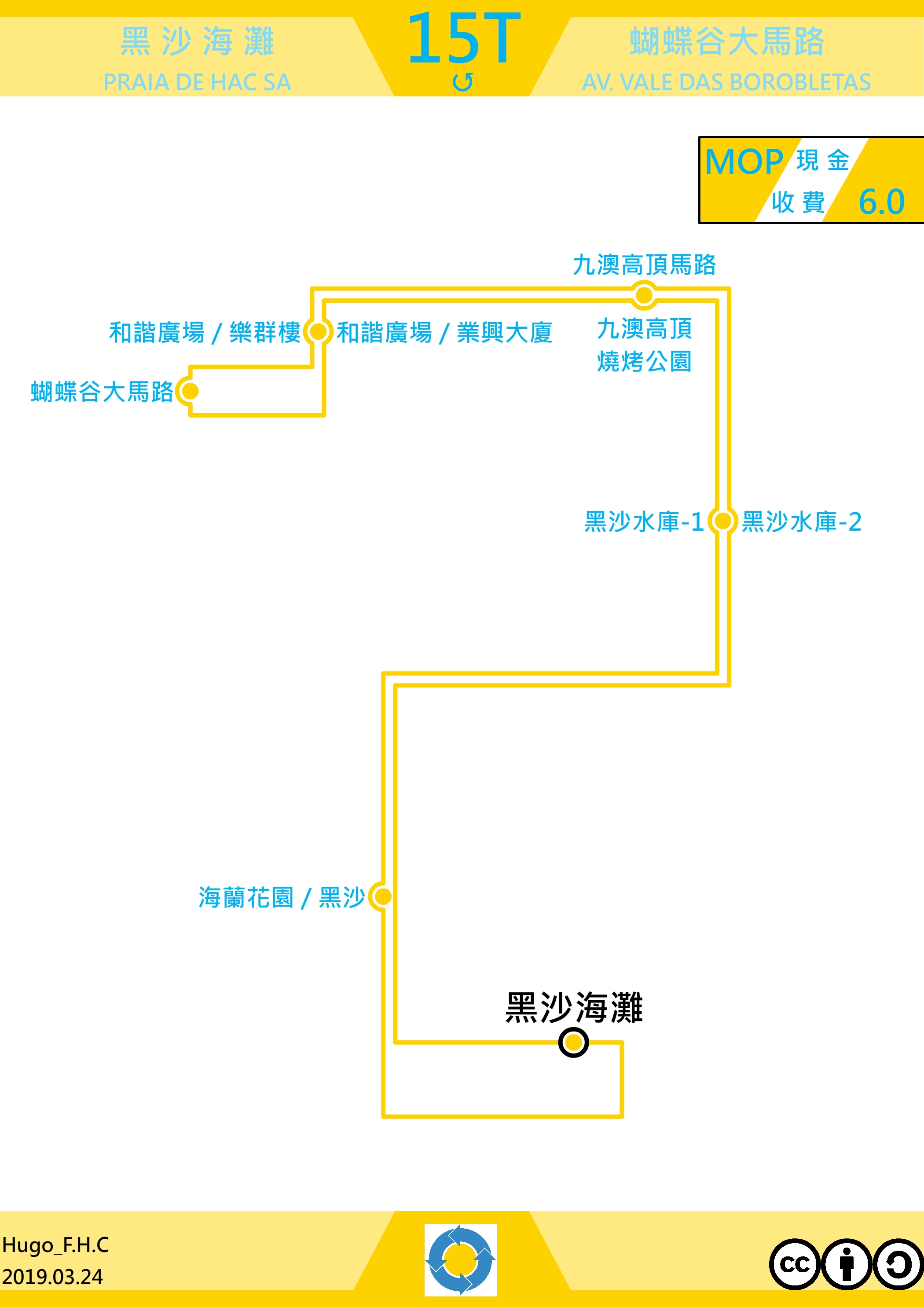 澳門巴士15T走線圖